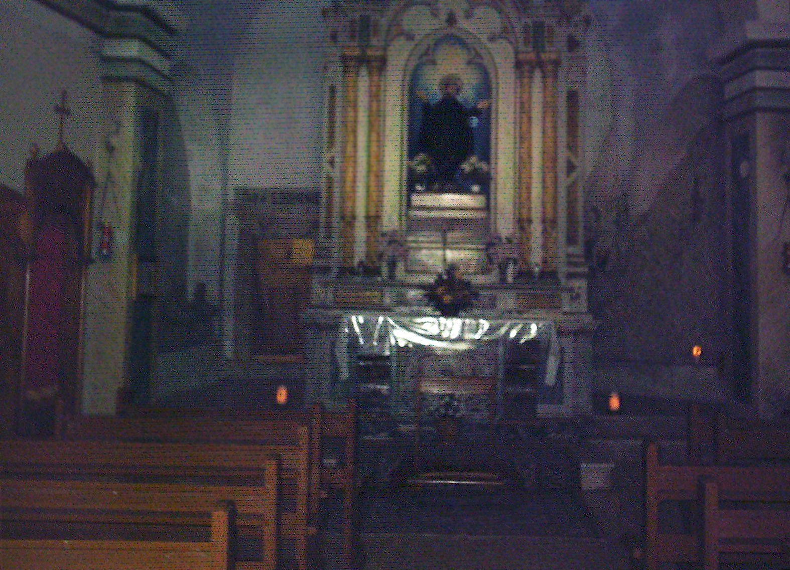 Chiesa eremo San Domenico Licensing Categoria:Immagini trasferibili su Commons